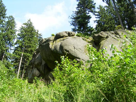 Skalní útvar Medůvka (katastr obce Velká Lhota)